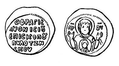 Пячатка Дыянісія, епіскапа Полацка